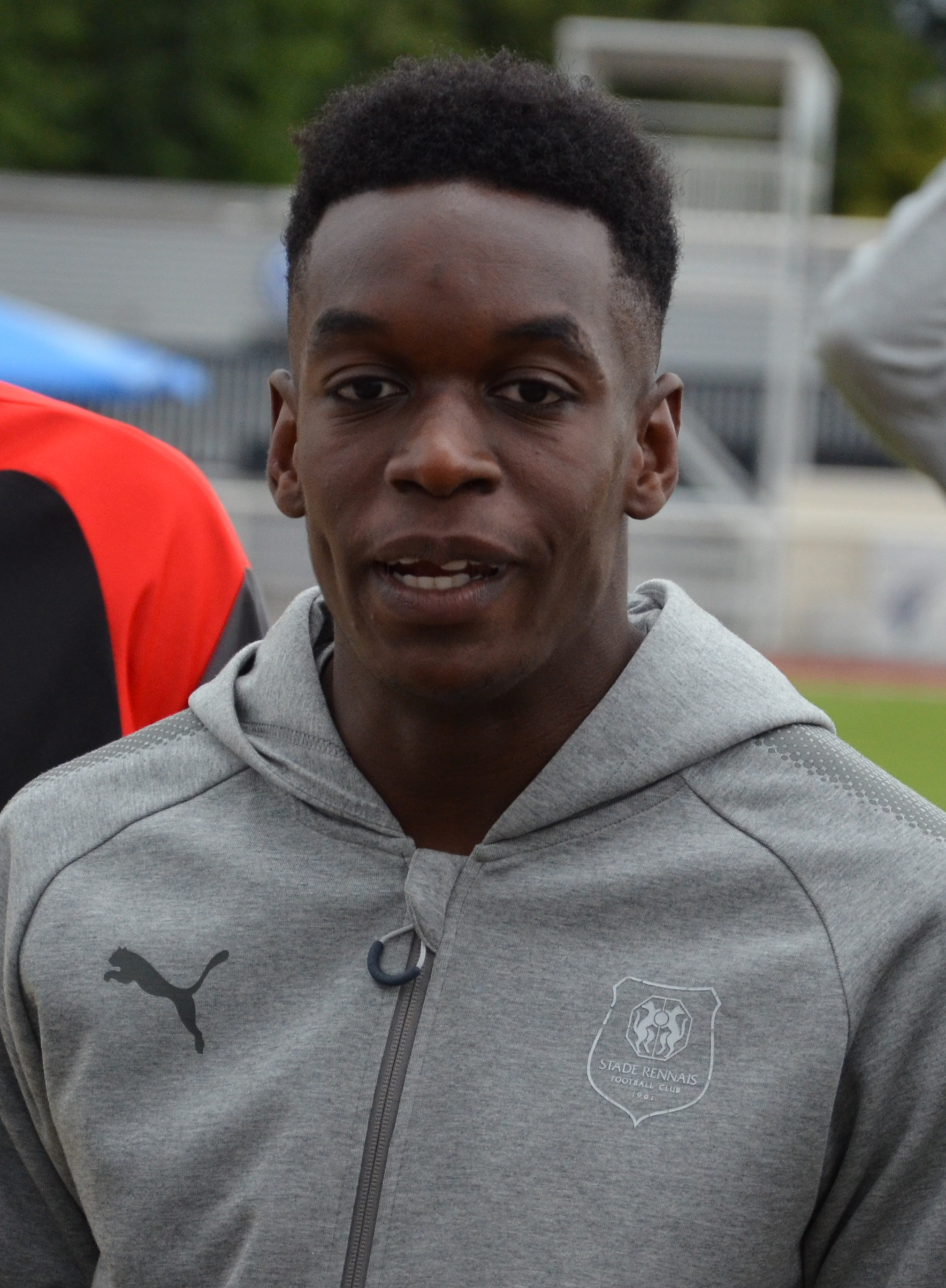 Photographie prise lors du match opposant le Stade rennais au SM Caen en match amical au stade Pierre-Compte de Vire le 22 juillet 2017. Ici, Faitout Maouassa.